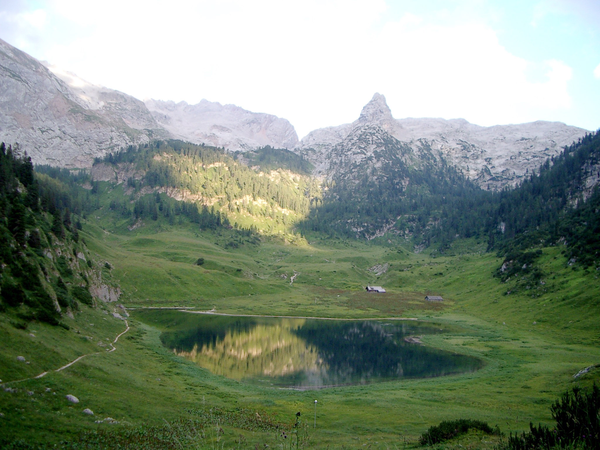 Der Funtensee am Rande des Steinernen Meers